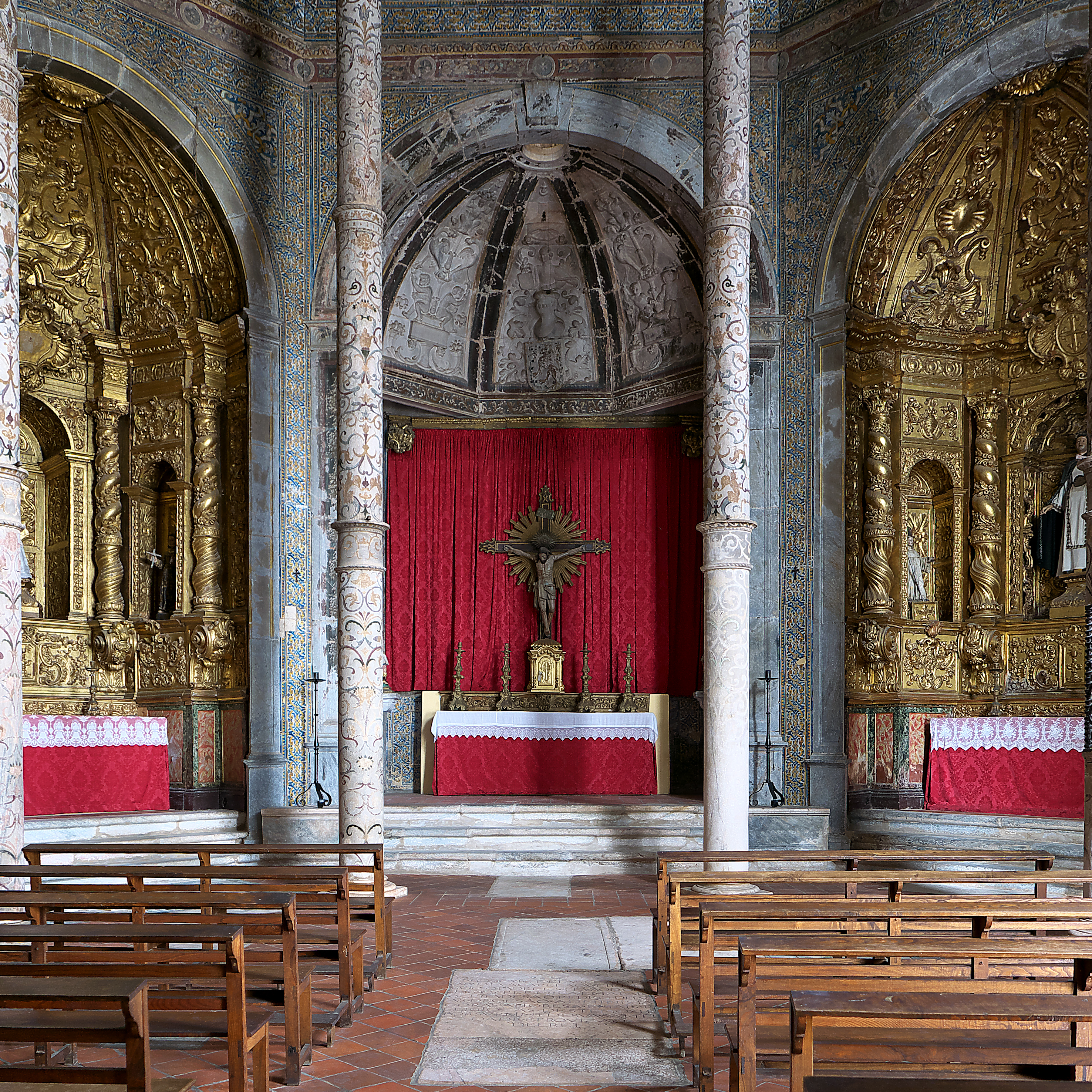 Capilla mayor de la iglesia con planta octogonal (1557)